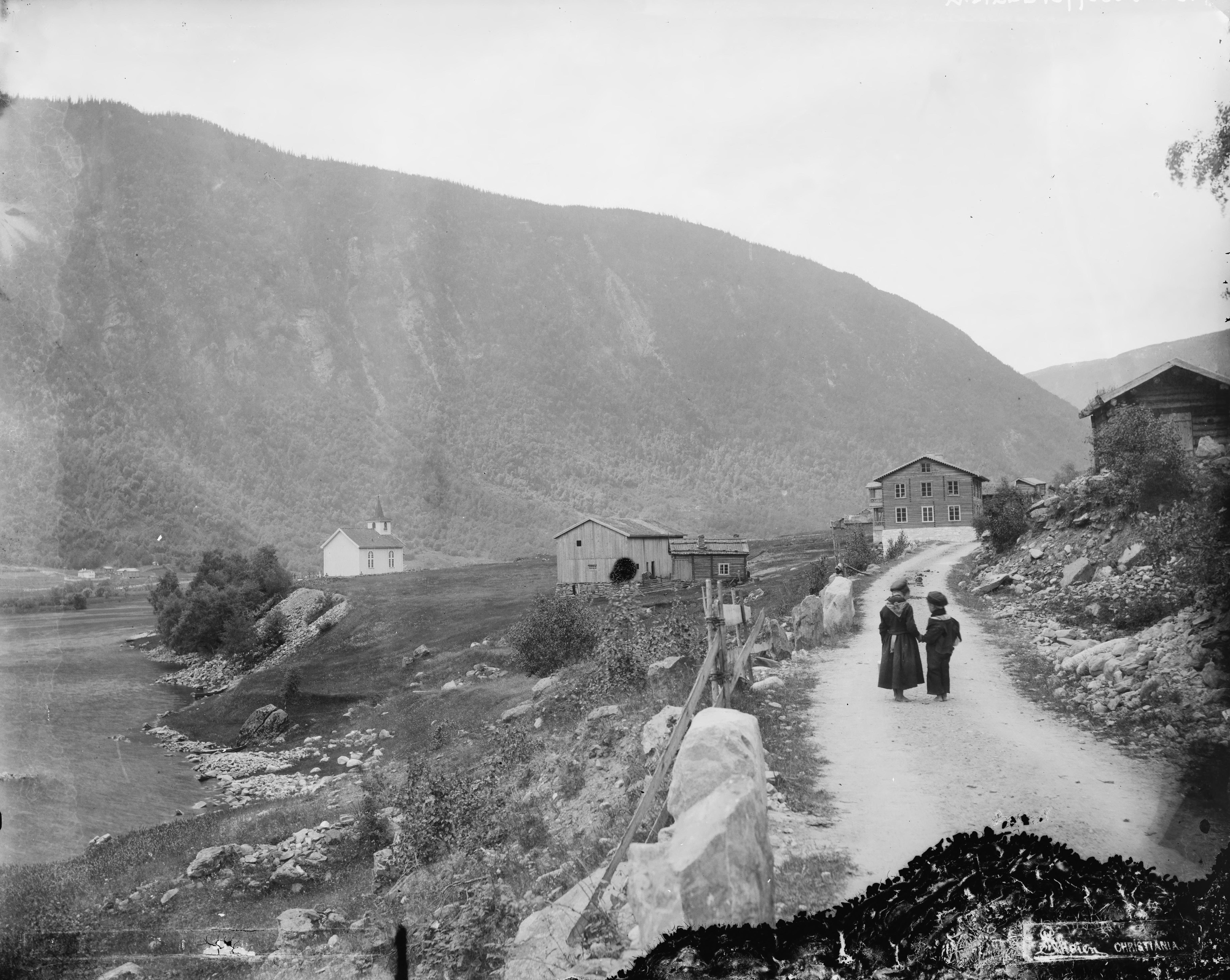 Påskrift negativ: [Uleselig] Christiania Skøien Påskrift negativ: 168 Vestfjorddalen [Riksantikvaren] Påskrift konvolutt: A-168 Vestfjorddalen. Mæl kirke [Riksantikvaren] Sted: Mæl,Vestfjorddalen Kommune: Tinn Fylke: Telemark Tagger: landskap M kirke bebyggelse kjerrevei barn dalf